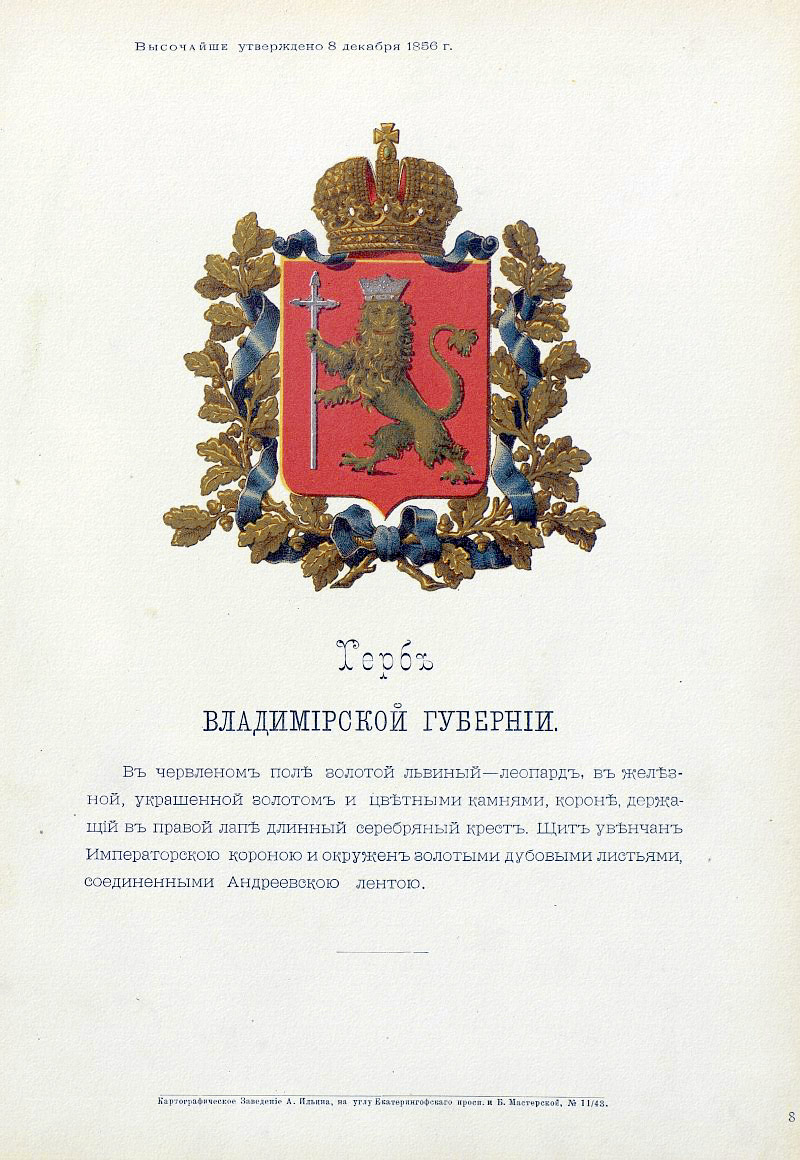 Official Russian Empire coat of arms Vladimir Governorate. Герб Российской Империи Владимирской губернии с официальным описанием в Гербовнике Бенке. Утверждён Императором Всероссийским Александром Вторым.